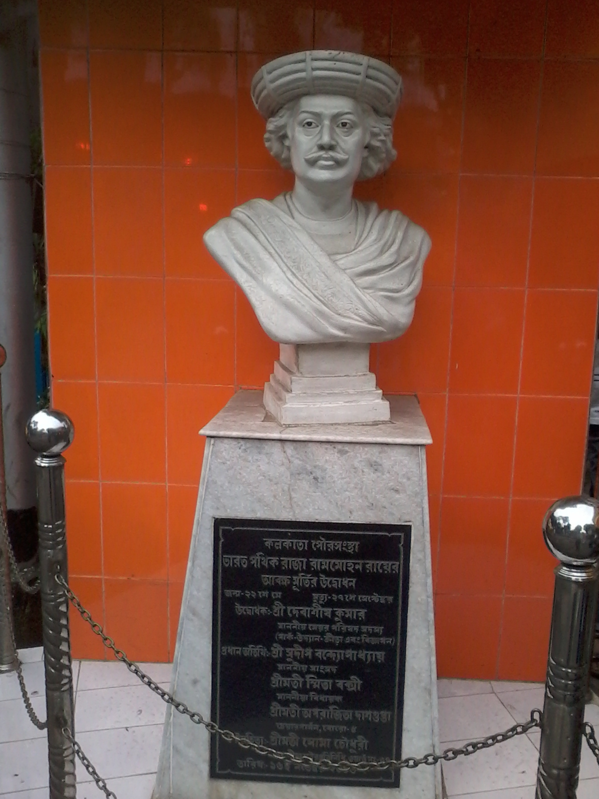 Wiki Loves Monument 2019 Photograph